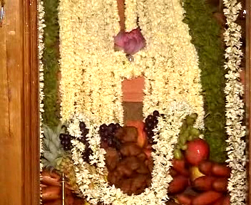 I Vaikunda Raja, took this photo graph.